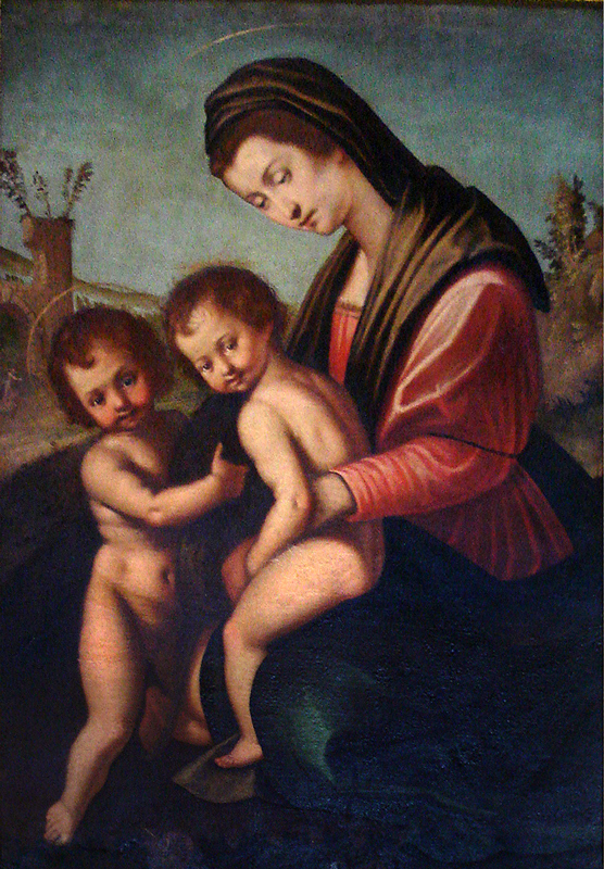 Maria, Jesus e o Batista